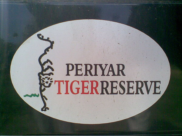 പെരിയാർ കടുവ സങ്കേതത്തിന്റെ ചിഹ്നം